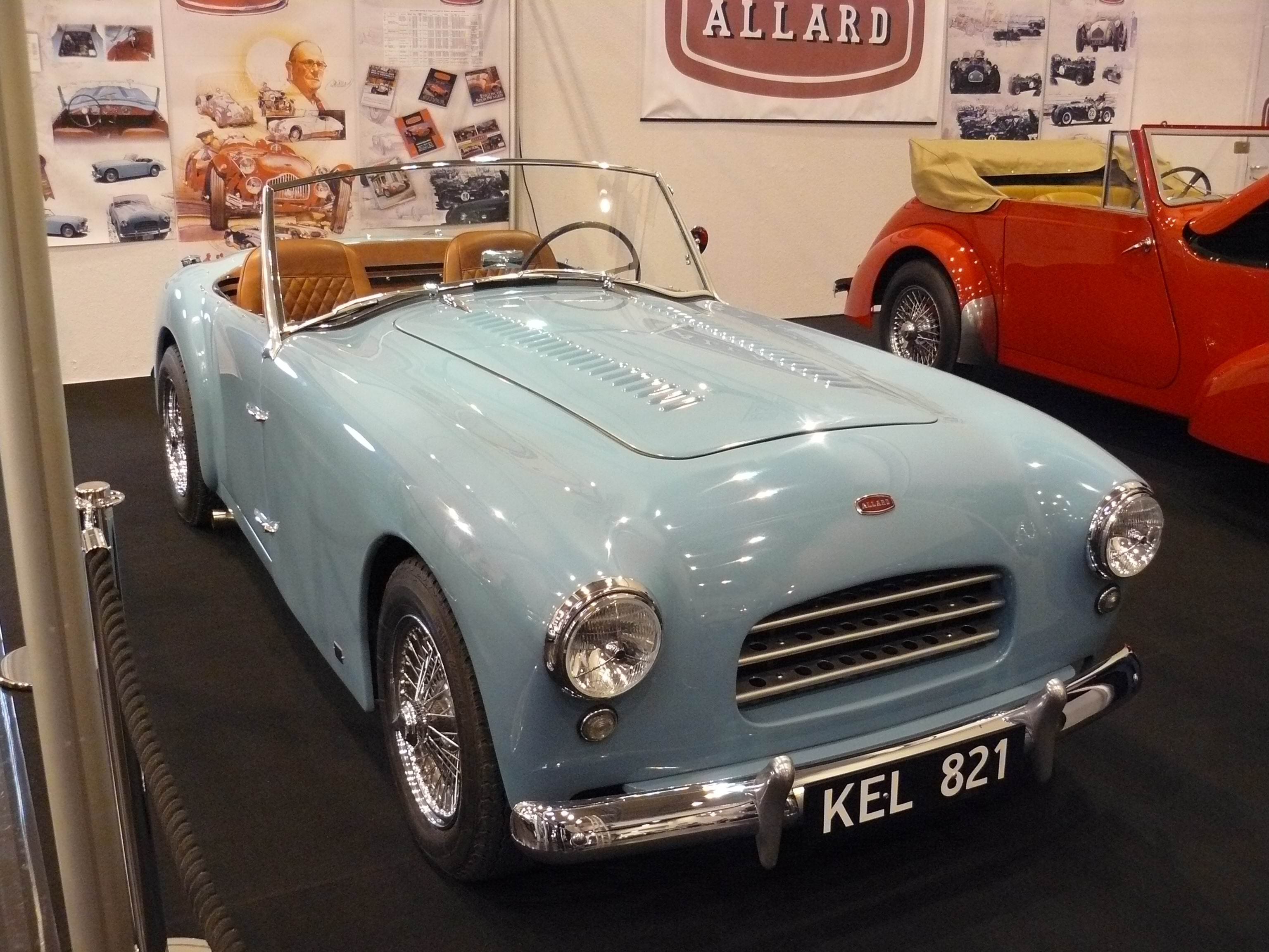 Essen 2011